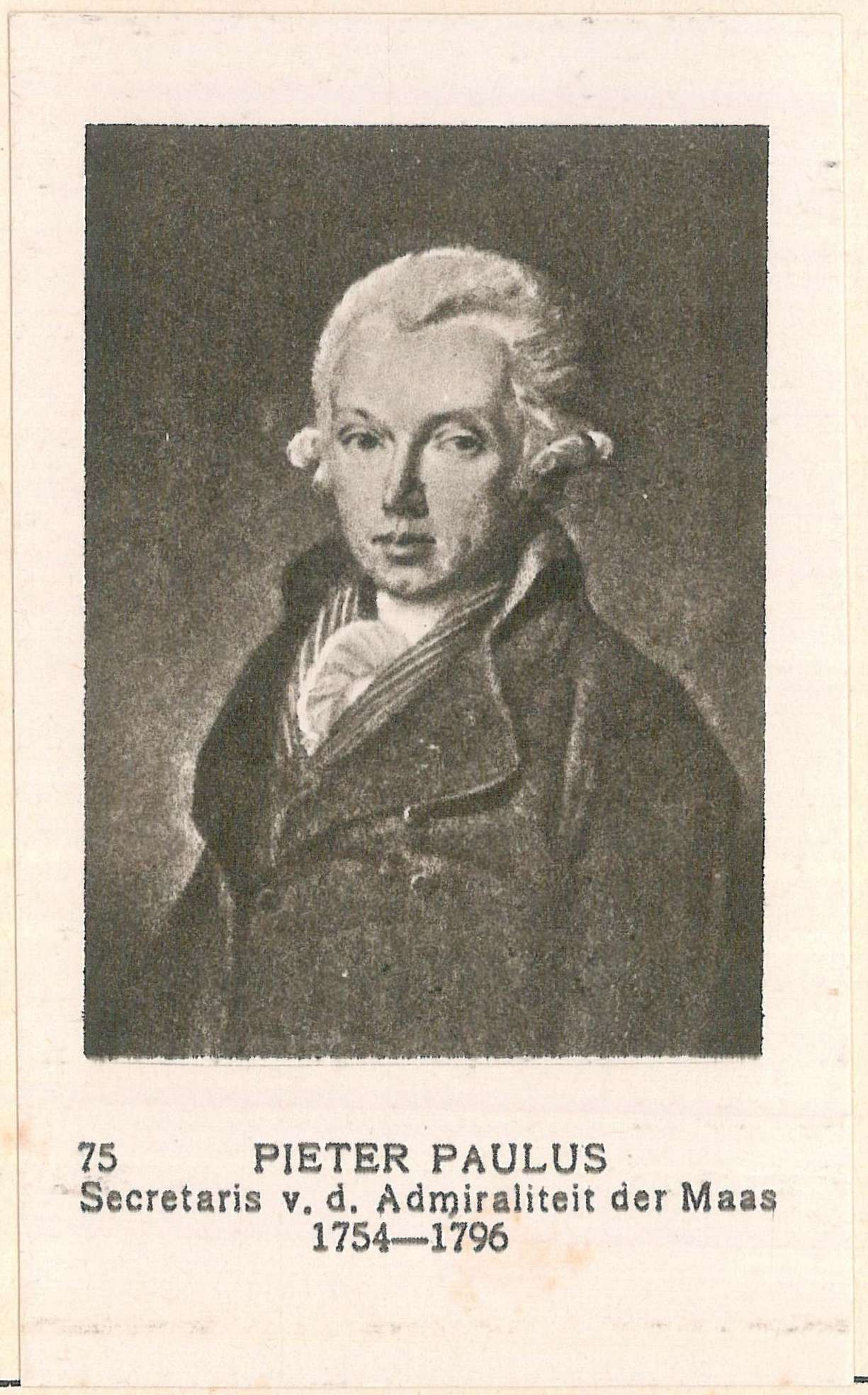 75 Pieter Paulus, Secretaris van de Admiraliteit der Maas, 1754-1796. Vaderlandse Historie 2 (1926)